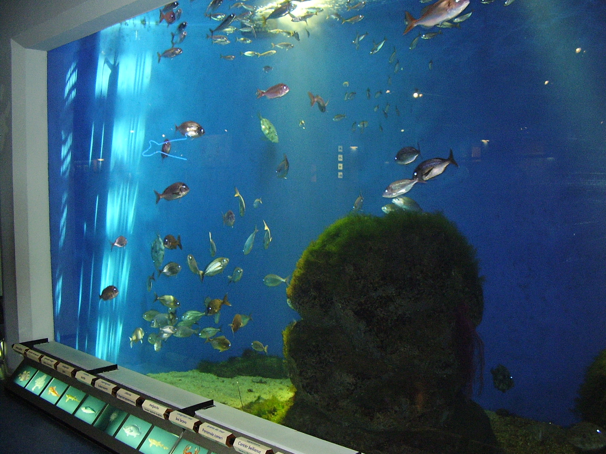 Uno de los acuarios de la Sala Maremagnum del Aquarium Finisterrae, en La Coruña